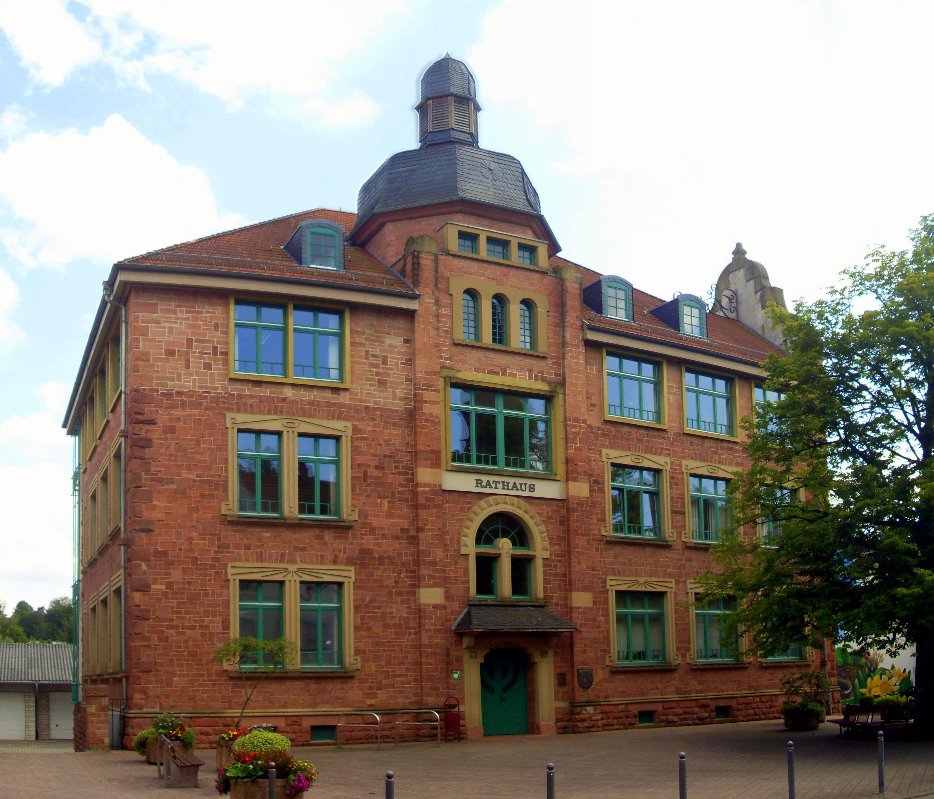 Ratusz w Bammental